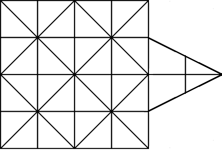 虎棋棋盤的一種。